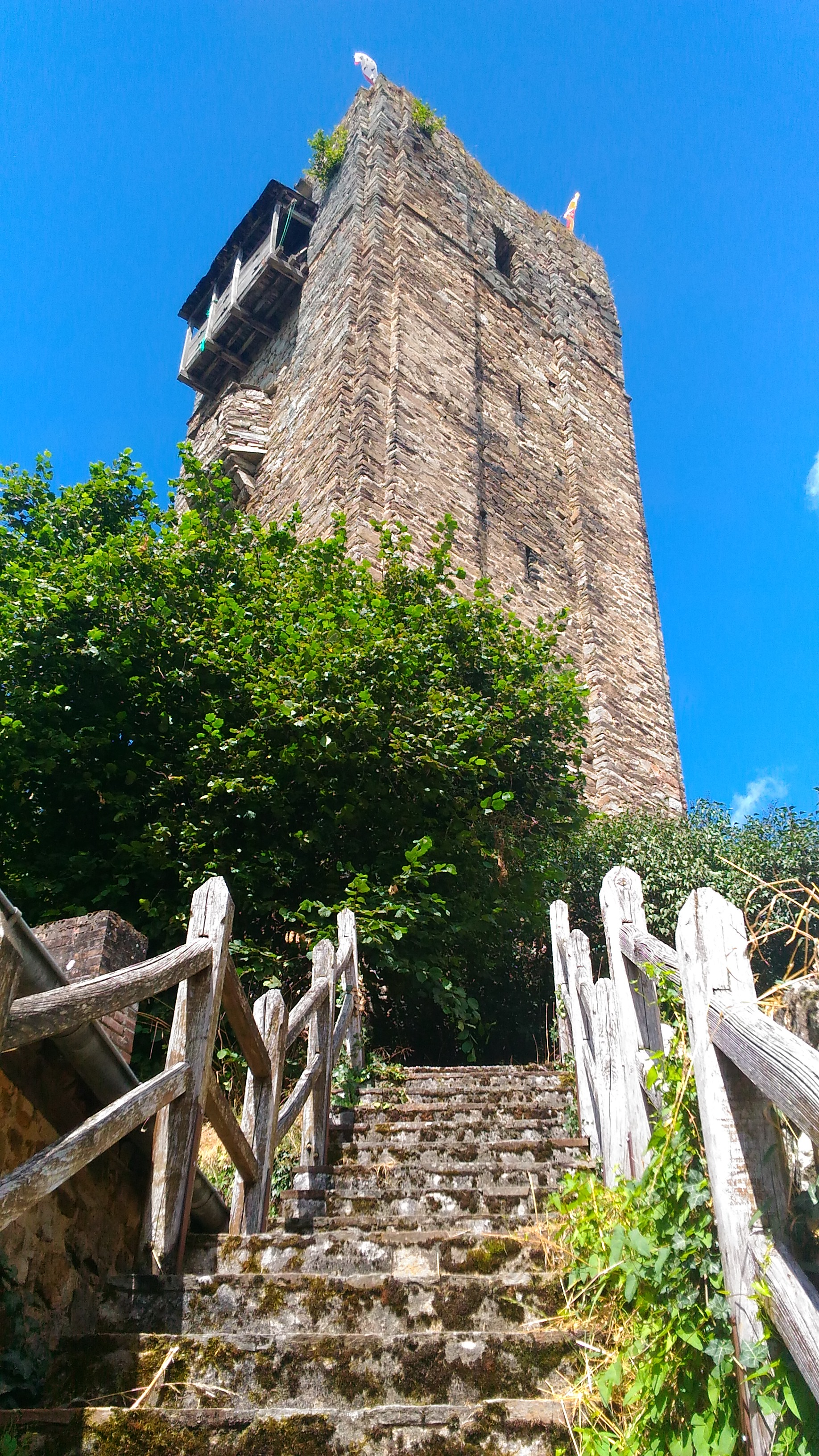 Tour de la commune de Salon-la-Tour